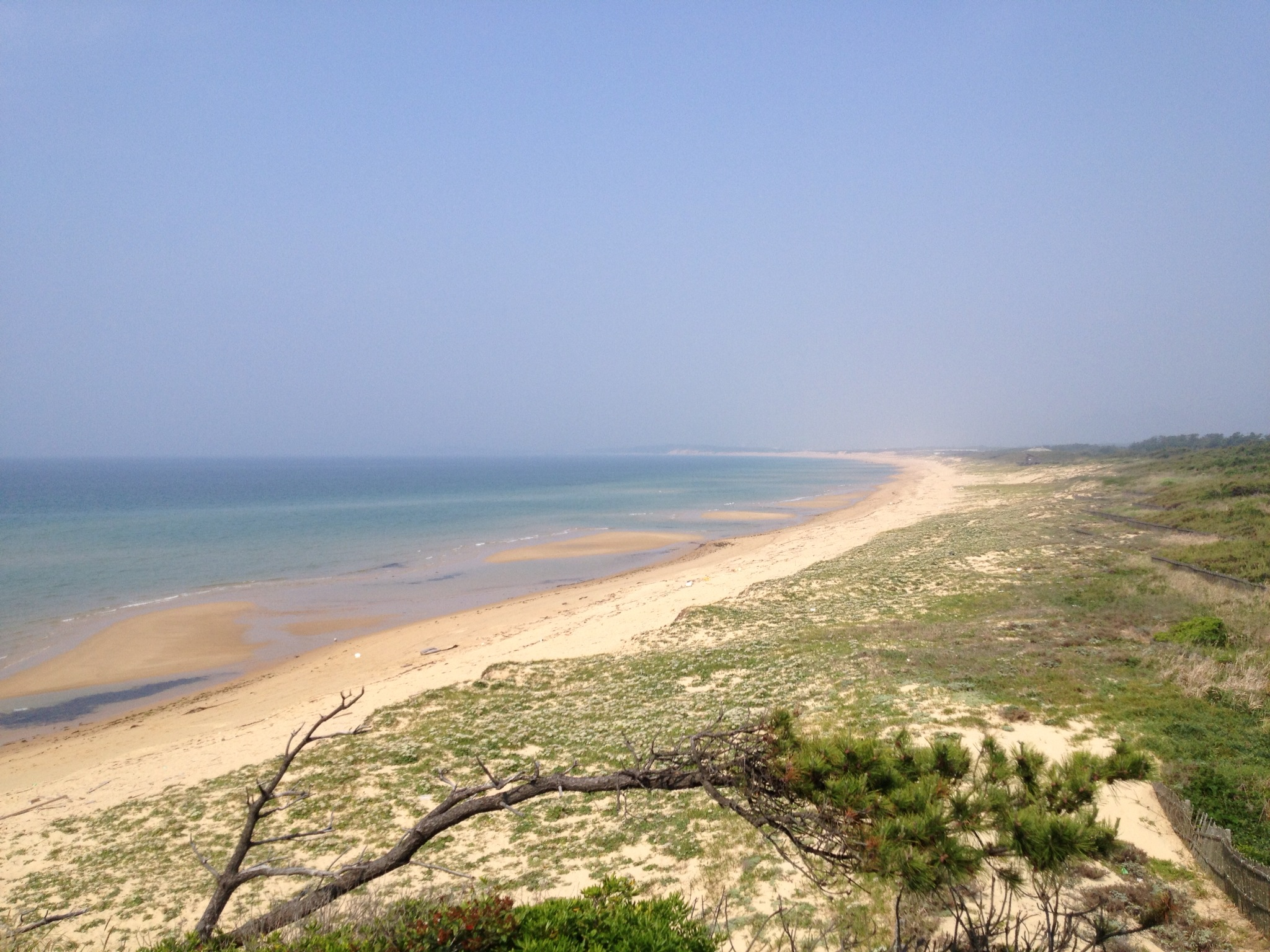 海の中道海浜公園の砂浜(北)